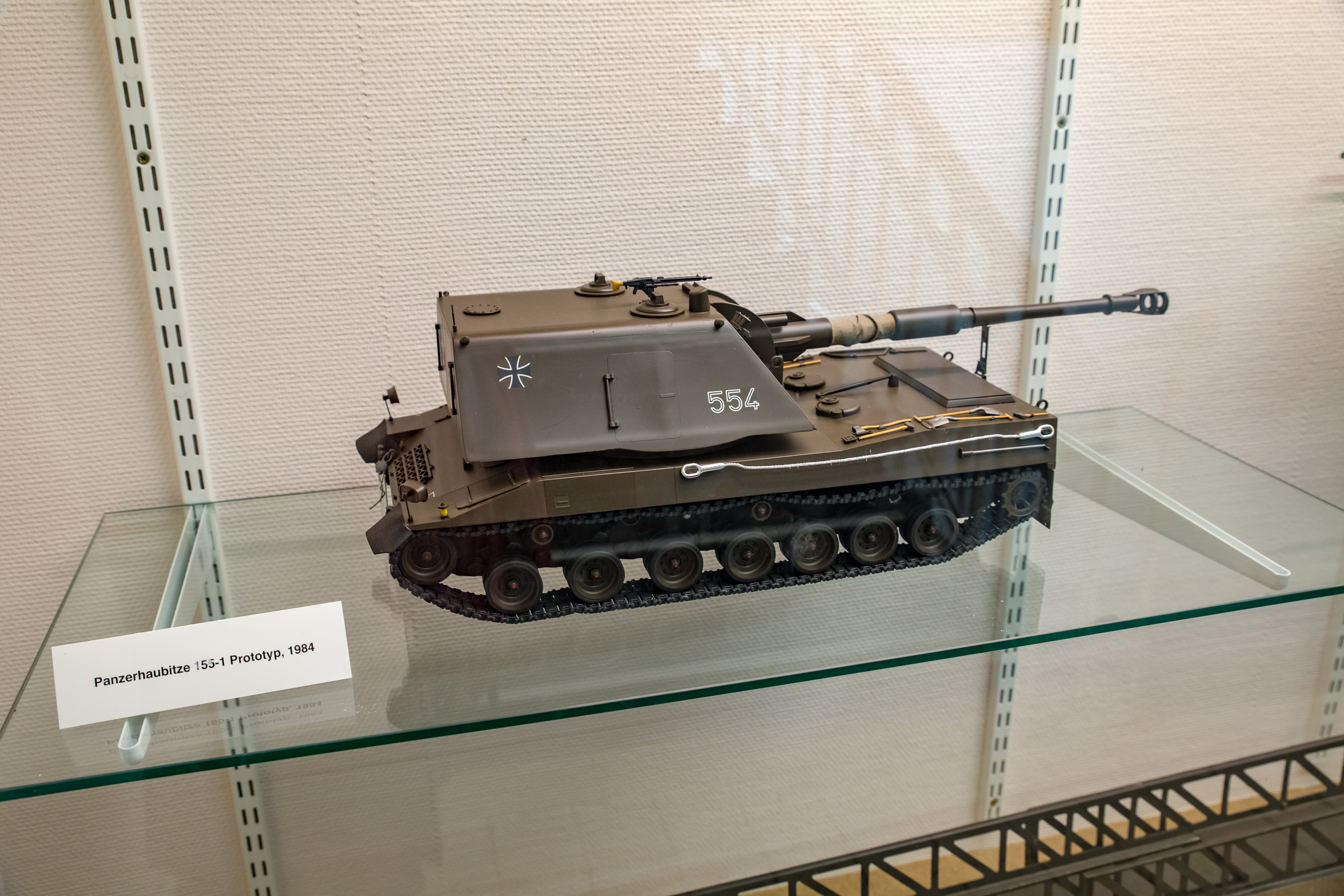 Wehrtechnische Sammlung der Bundeswehr